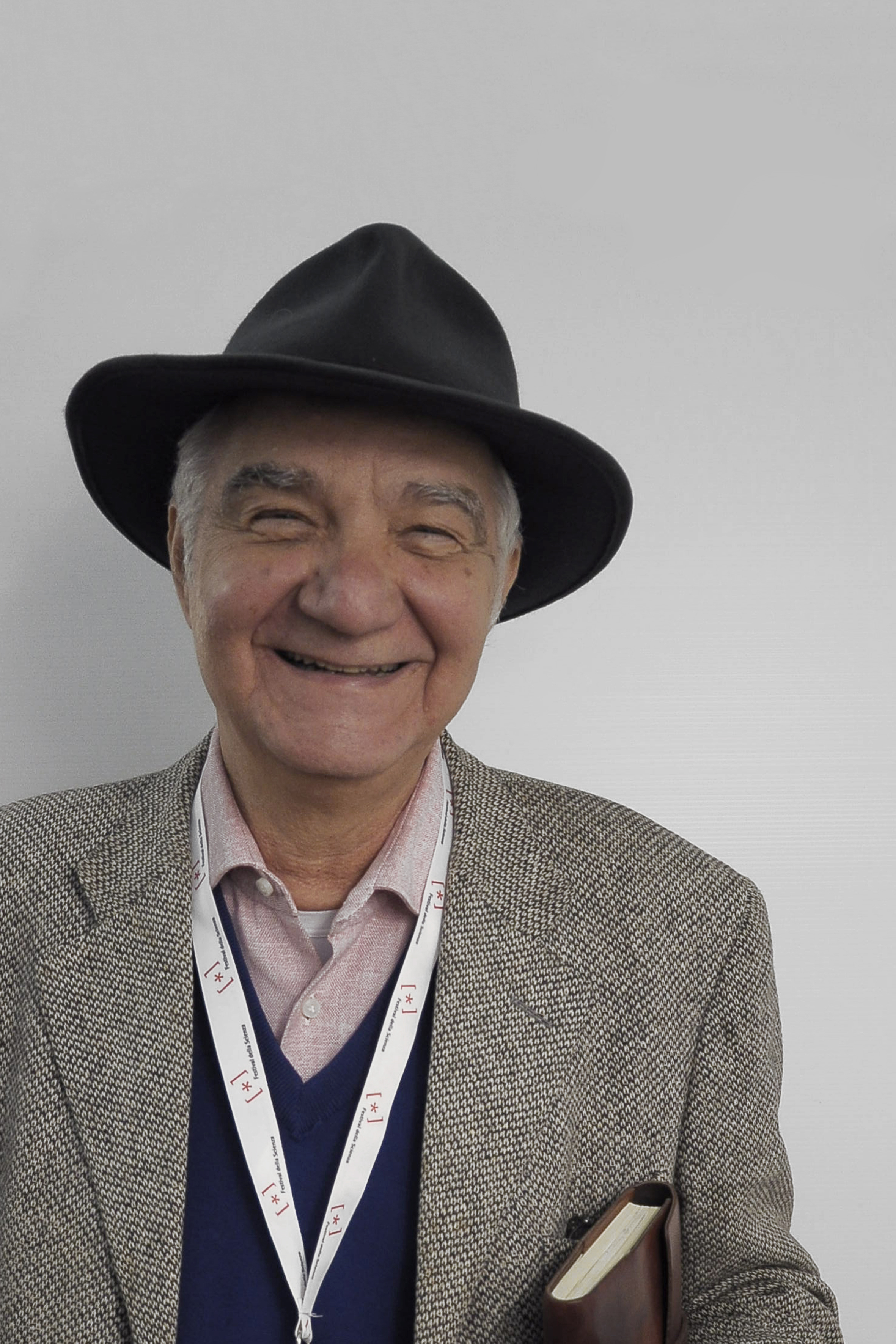 Foto: Cirone-Musi